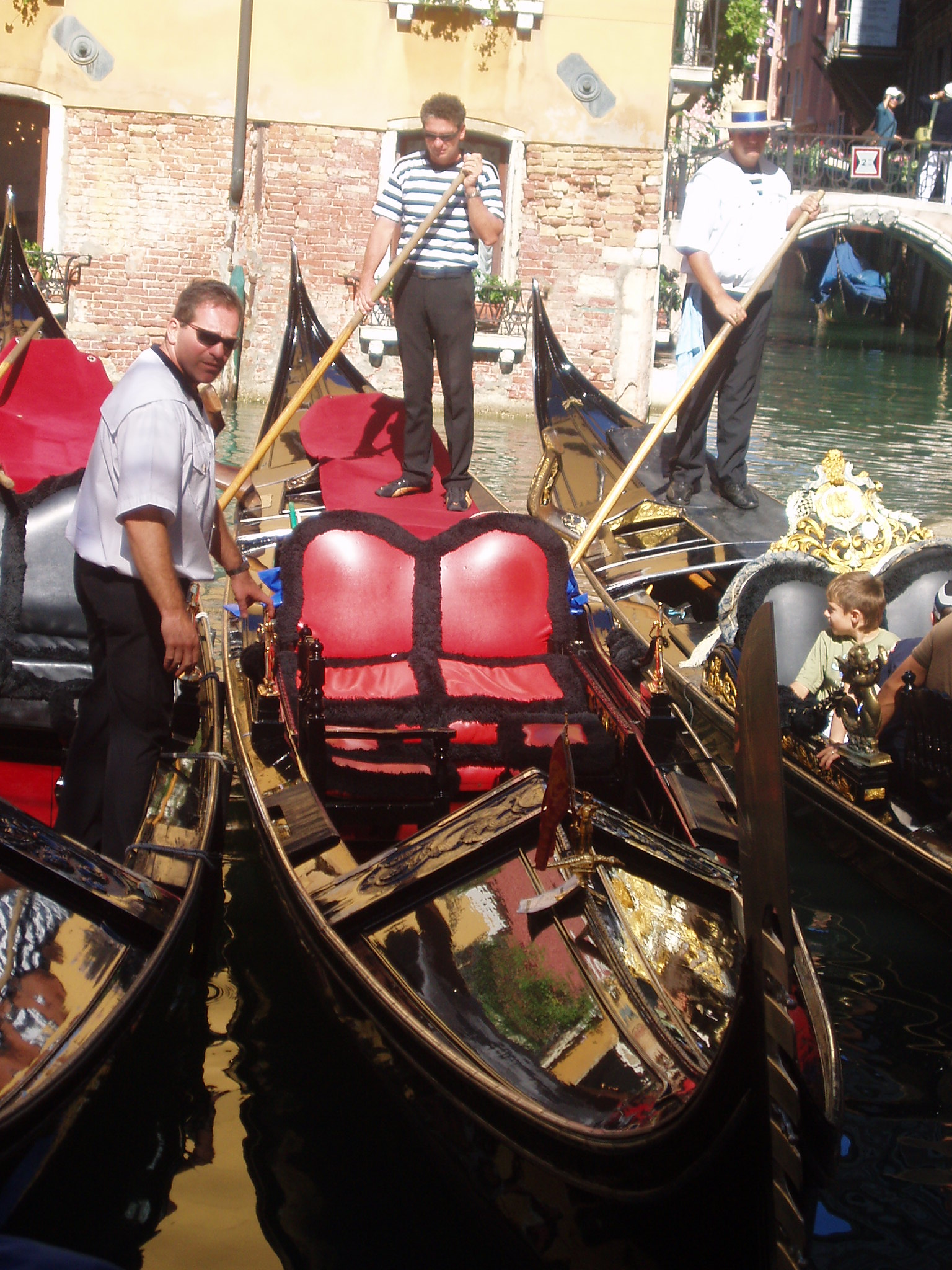 gondolas in bacino orseole with ponte del cavalletto in background